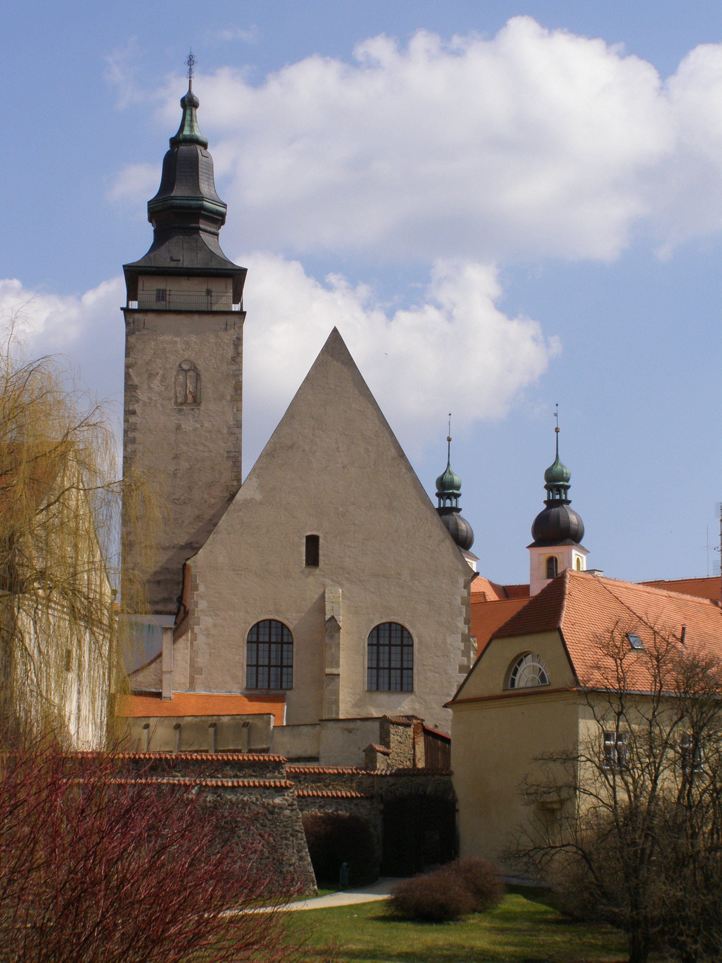 Telč, Kostel svatého Jakuba